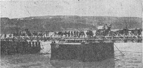 Convoi de trasuri din Div. 10-a trecand Dunarea la Flamanda.